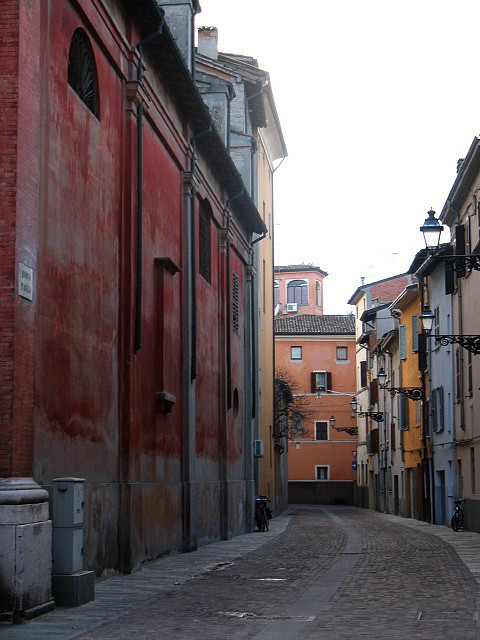 Strada dell'Oltretorrente a Parma.